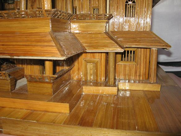 കേരളീയ വാസ്തുശിൽപ്പ വിദ്യക്കു മകുടോദാഹരണമായി നിൽക്കുന്ന നാലുകെട്ടുകൾ, മനകൾ, ഇല്ലങ്ങൾ എന്നിവയുടെ മാതൃകകൾ ഈർക്കിലും മുളയും ഉപയോഗിച്ചു നിർമ്മിക്കുകയാണു ലിജീഷ്‌ വേങ്ങേരി എന്ന കലാകാരൻ .തൂണുകളും, ചാരുപടിയും, വാതിലുകളും, നടുമുറ്റവും എല്ലാം പഴമയുടെ ഭംഗിയിൽ തന്നെയാണു നിർമ്മിച്ചിരിന്നതു. ആധുനികവത്കരണതിണ്റ്റെ പേരിലും,പരിപാലിക്കാനുള്ള വിഷമതിന്റെ പേരിലും നമുക്കു നഷ്ടം വന്നുകൊണ്ടിരിക്കുകയാണു ഈ വാസ്തുശിൽപ്പ പൈത്രുകങ്ങൾ.ഇവയോടുള്ള അഗാധമായ താൽപര്യമാണു ഇത്തരത്തിലുള്ള വസ്തുക്കളുടെ ചെറു രൂപങ്ങൾ ഉണ്ടാക്കുന്നതിലേക്കു ഈ കലാകാരനെ ശ്രദ്ധ തിരിച്ചു വിട്ടത്‌. ഈർക്കിൾ ഉപയോഗിച്ചു ഉണ്ടാക്കുവാനുദ്ധേശിക്കുന്ന ഭവനത്തിനെ പല ഭാഗങ്ങളാക്കി ആദ്യം ഉണ്ടാക്കുന്നു, പിന്നീട്‌ ഇവയെല്ലാം നല്ല പൊലെ ഉരച്ച്‌ മിനുസപ്പെടുത്തി പോളിഷ്‌ ചെയ്യുന്നു, അതിനു ശേഷം ഭാഗങ്ങൾ കൂട്ടി ചേർക്കുന്നു.. ഇവ പൂർത്തീകരിക്കനായി മാസങ്ങൾ വേണ്ടി വരുന്നു.